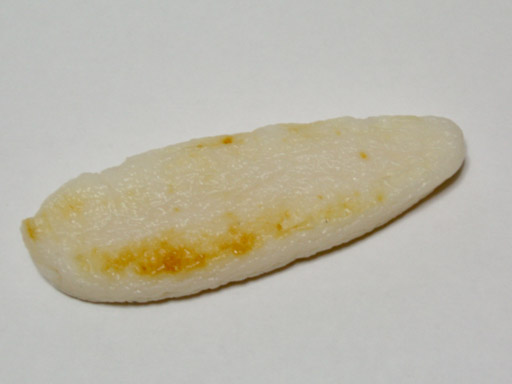 Sasakamaboko, bamboo-leaf-shaped fish paste